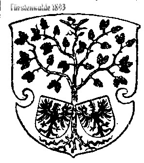 Wappen 1893 Fürstenwalde